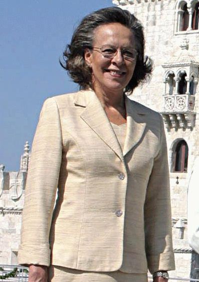 Maria José Ritta posa para fotos em frente à Torre de Belém.